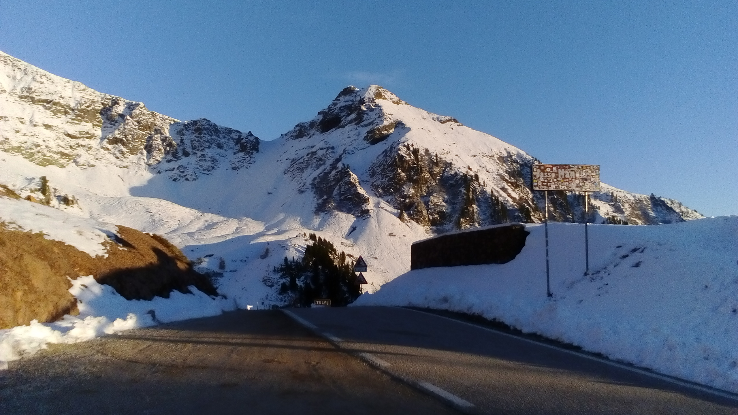 Passo Manghen - Lagorai (Q47493713)